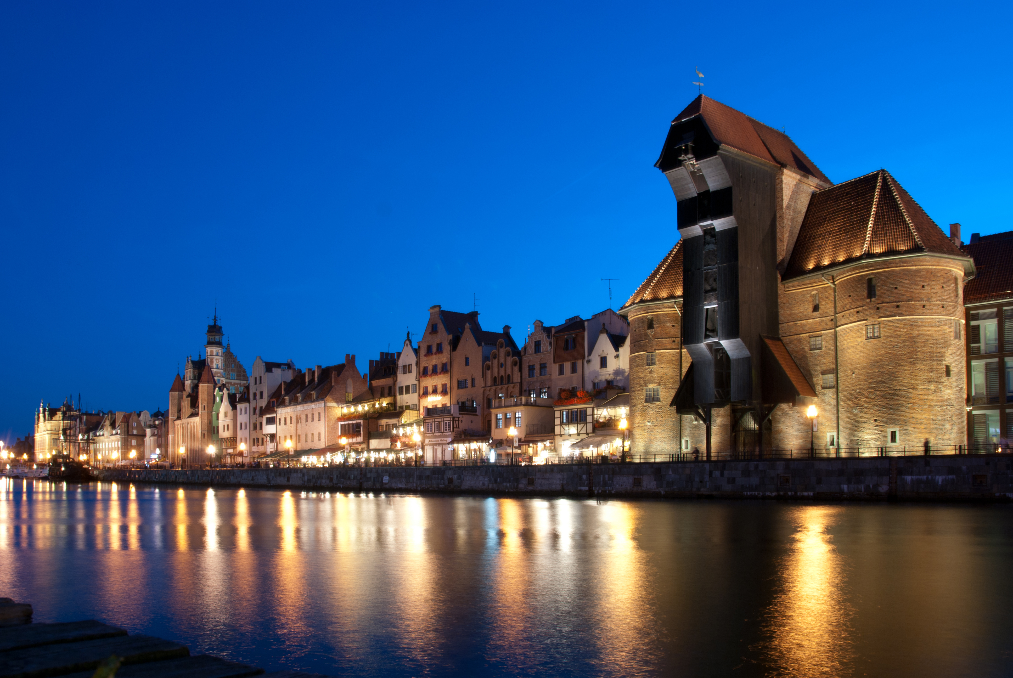 Das Krantor in Danzig (nachts)